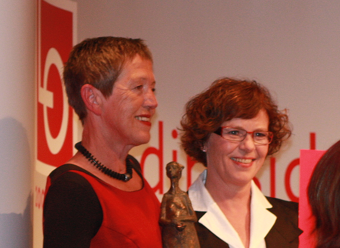 Tove Smaadahl